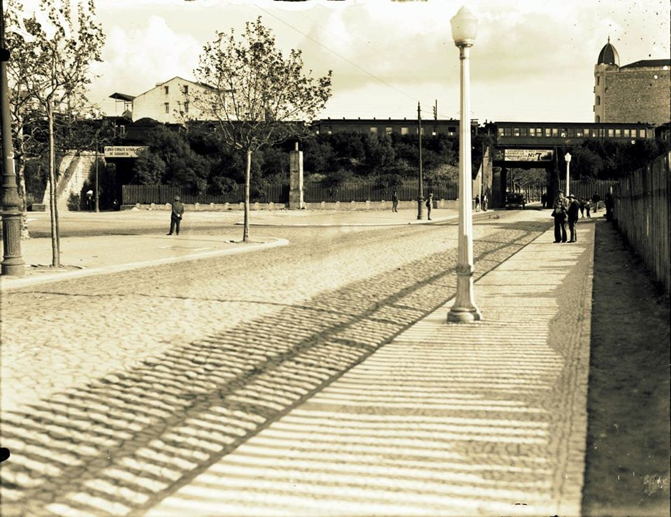 Vista do aterro ferroviário da Av. República, em Lisboa. Fotografia do arquivo d’O Século.